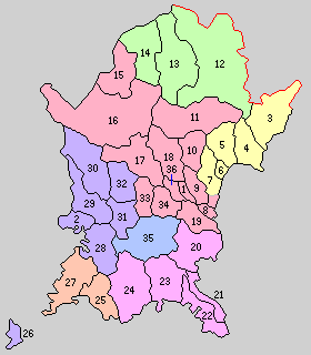 高知県幡多郡の町村制時点の町村。